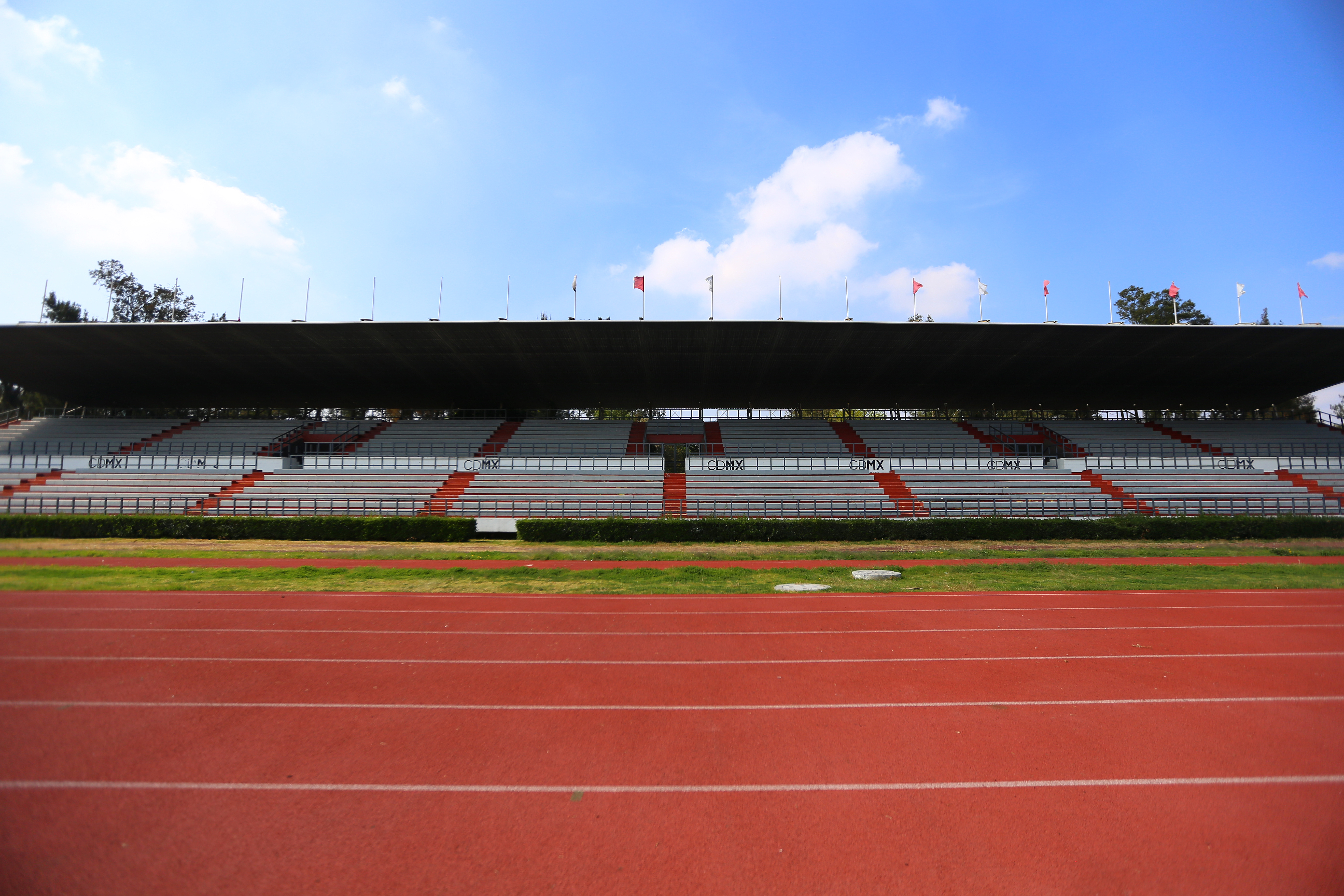 Estadio Principal Jesús Martinez "Palillo"